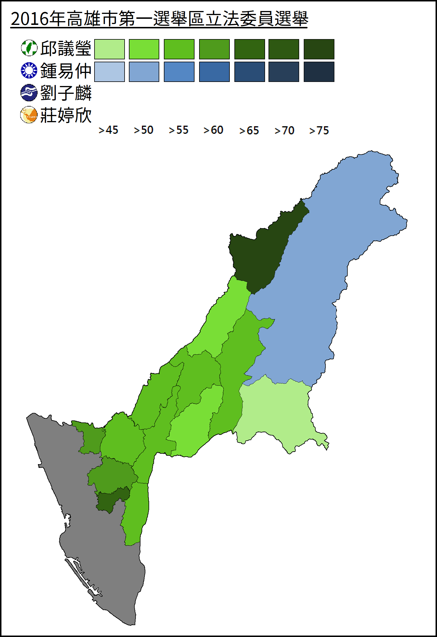 2016年高雄市第一選舉區立法委員選舉得票